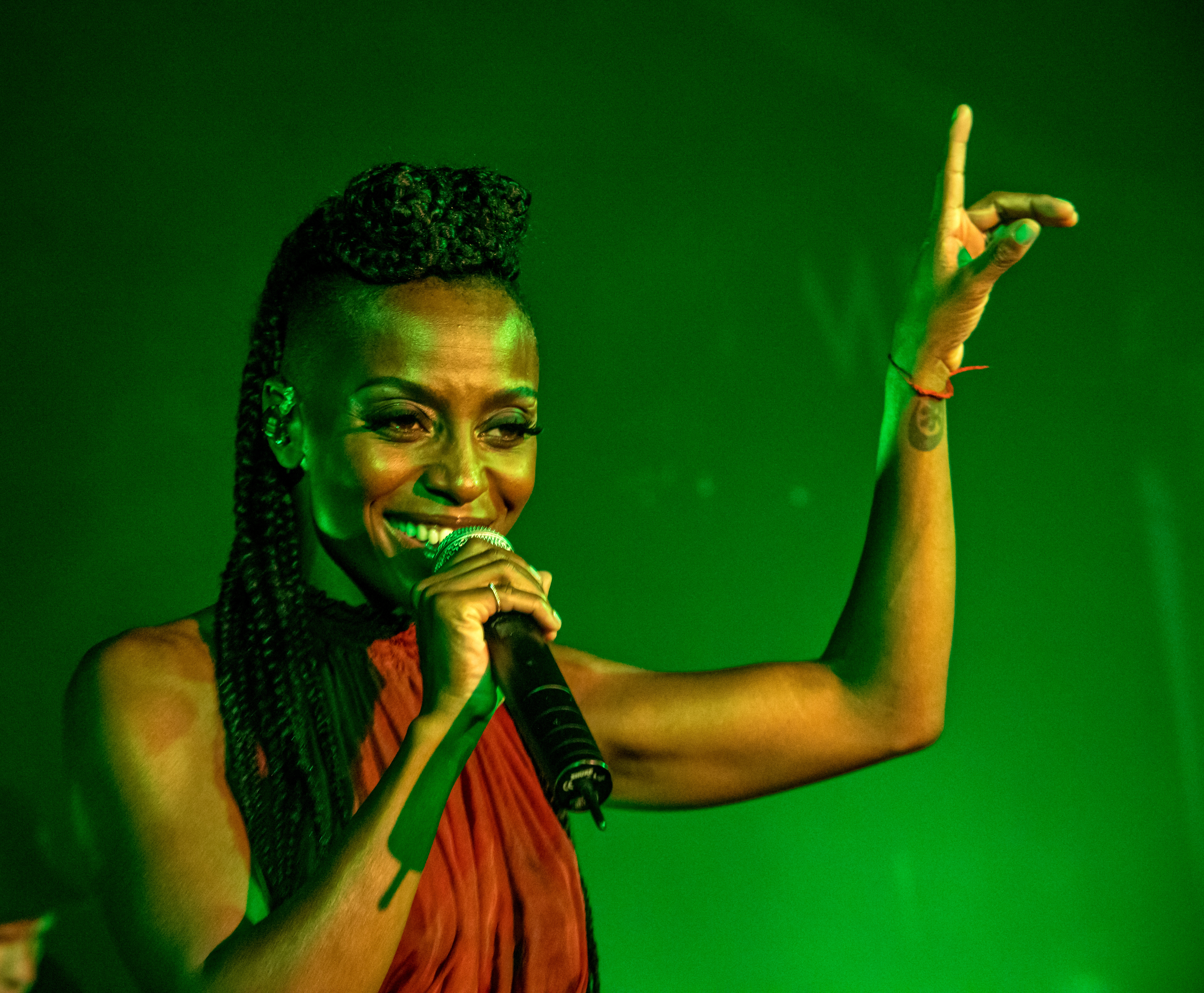 Bilder vom Zelt Musik Festival 2018 in Freiburg im Breisgau Morcheeba Auftritt am 31. Juli 2018 im Speigelzelt